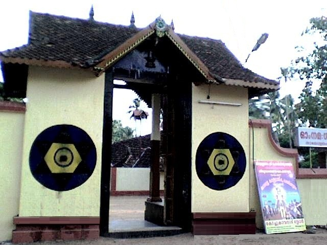 കൊല്ലം രാമേശ്വരം മഹാദേവക്ഷേത്രം